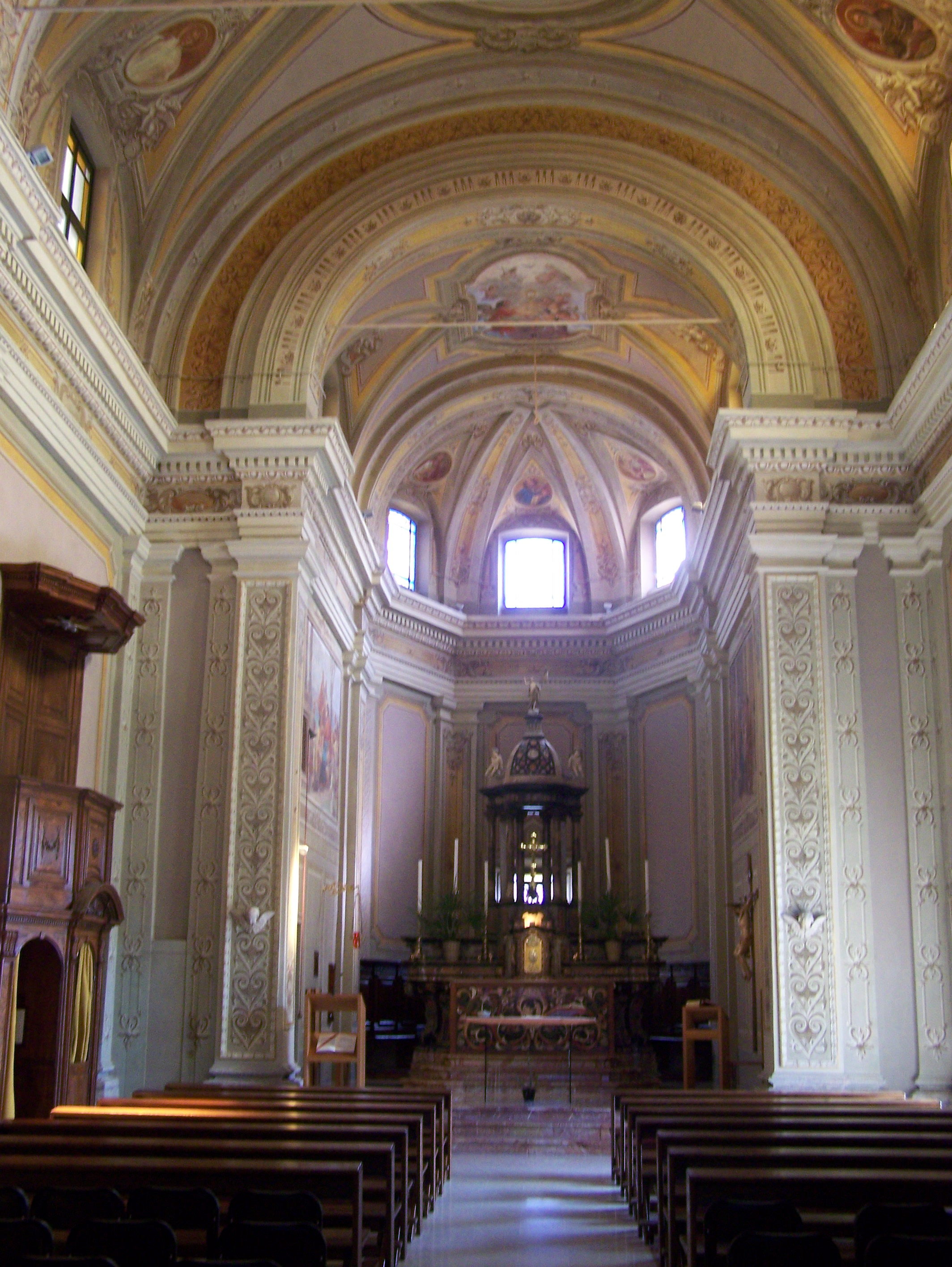 La vecchia chiesa parrocchiale di Mesero (MI) - Italy